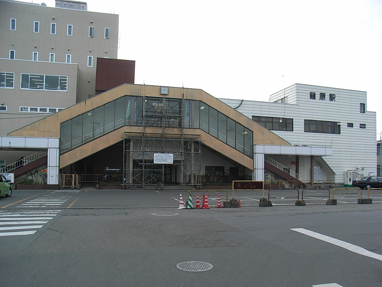 Kagohara Station (North Entrance) on JR Takasaki Line. (713,Niibori,Kumagaya-shi,Saitama-ken,JAPAN)